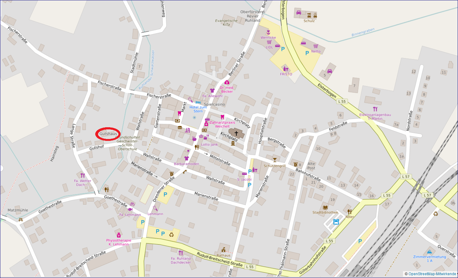 Ruhland, Stadtplan mit Markierung Heimatmuseum im "Gutshof"